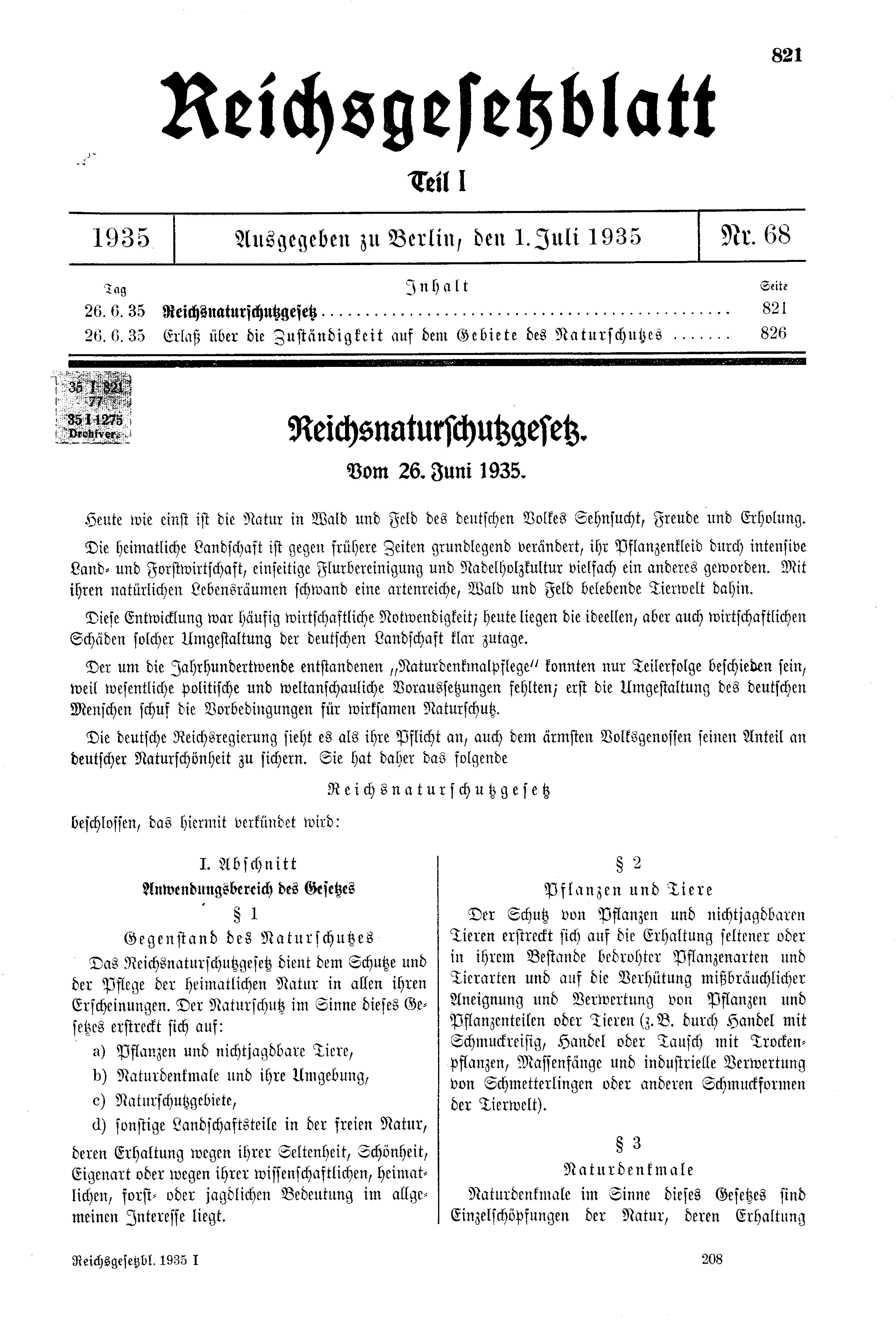 Reichsgesetzblatt 1935, veröffentlichung Reichsnaturschutzgesetz (RNG)